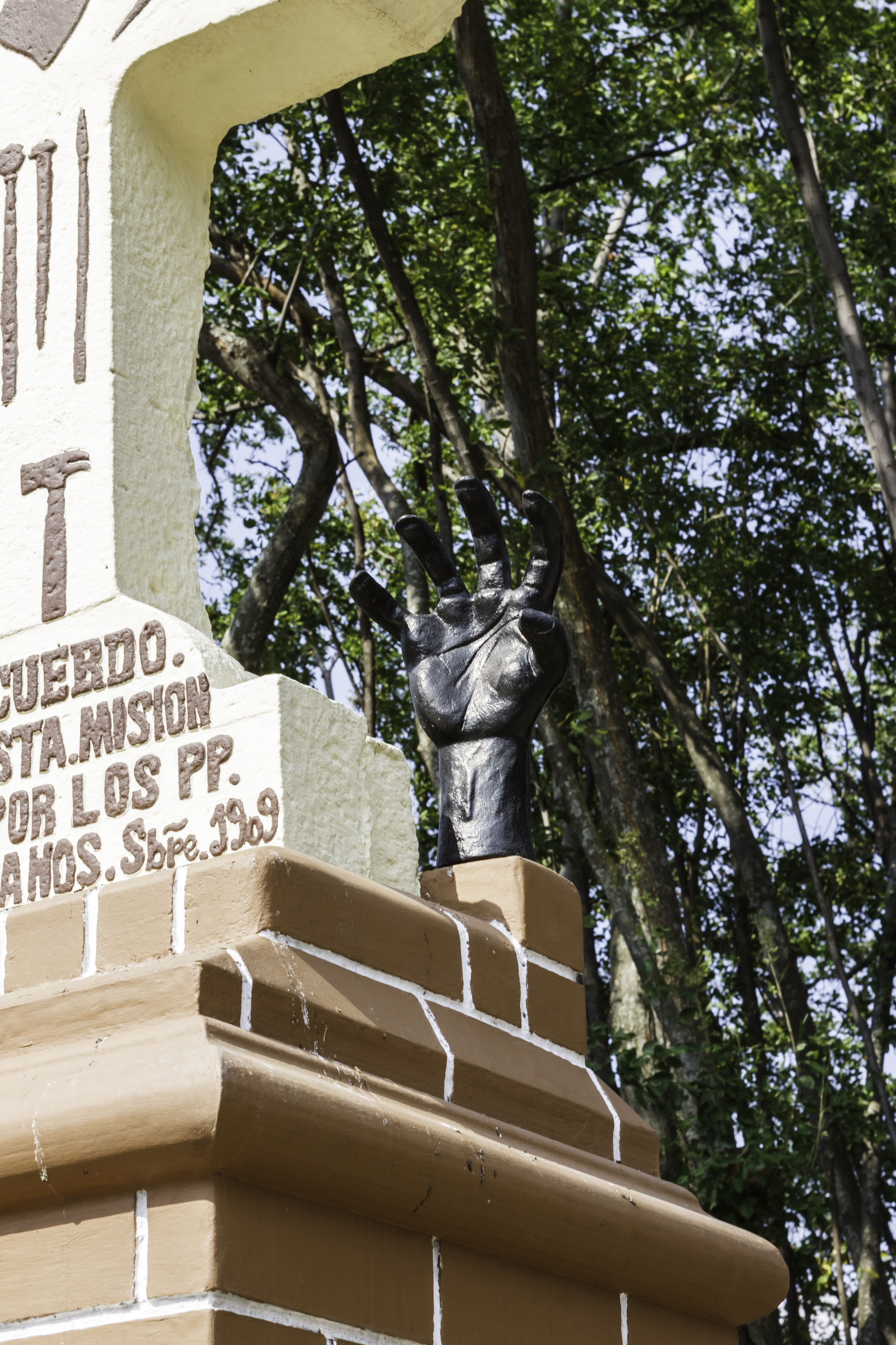 escultura de la cruz y la mano de negro en el Parque Artesanal